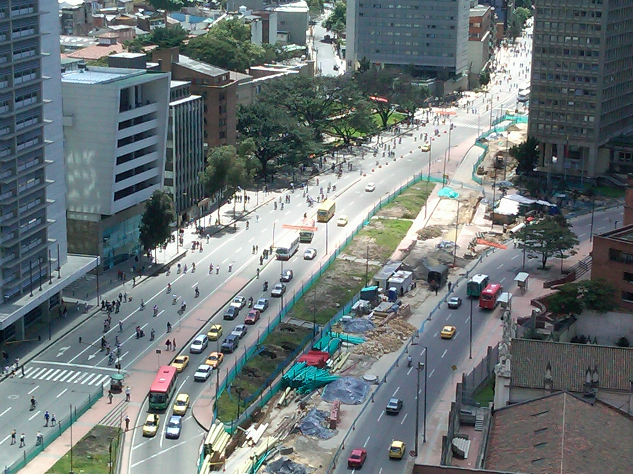 La Ciclovía por la Carrera Séptima con obras de la Fase 3 del TransMilenio visibles